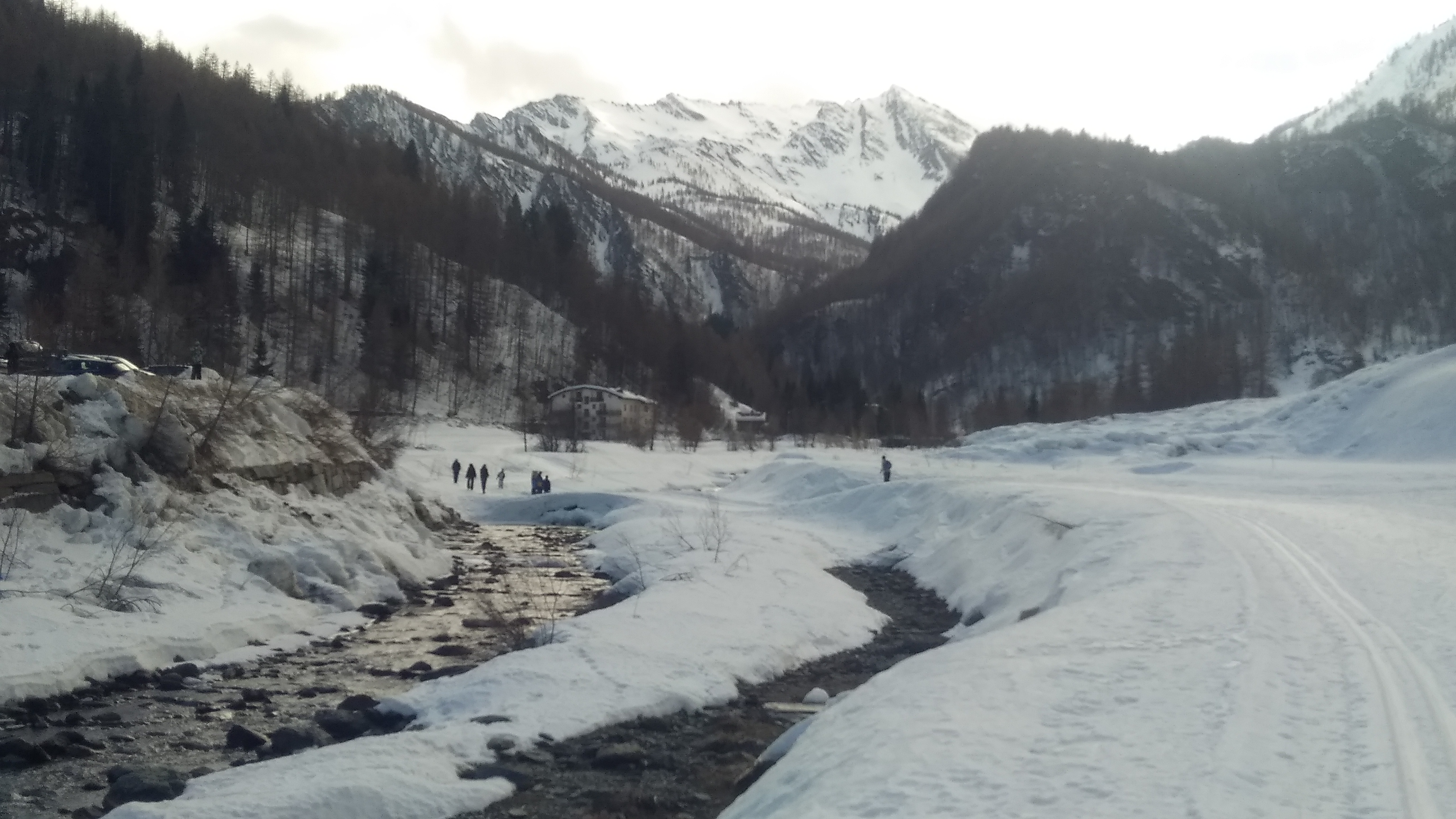 Il Germanasca d'inverno presso Prali (To)